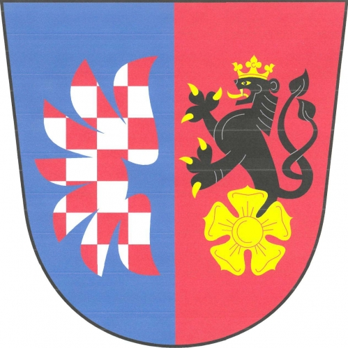 Znak, Janoušov, okres Šumperk